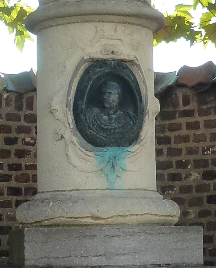 Borstbeeld in relief van Pieter Hubertus Baltassar Motké